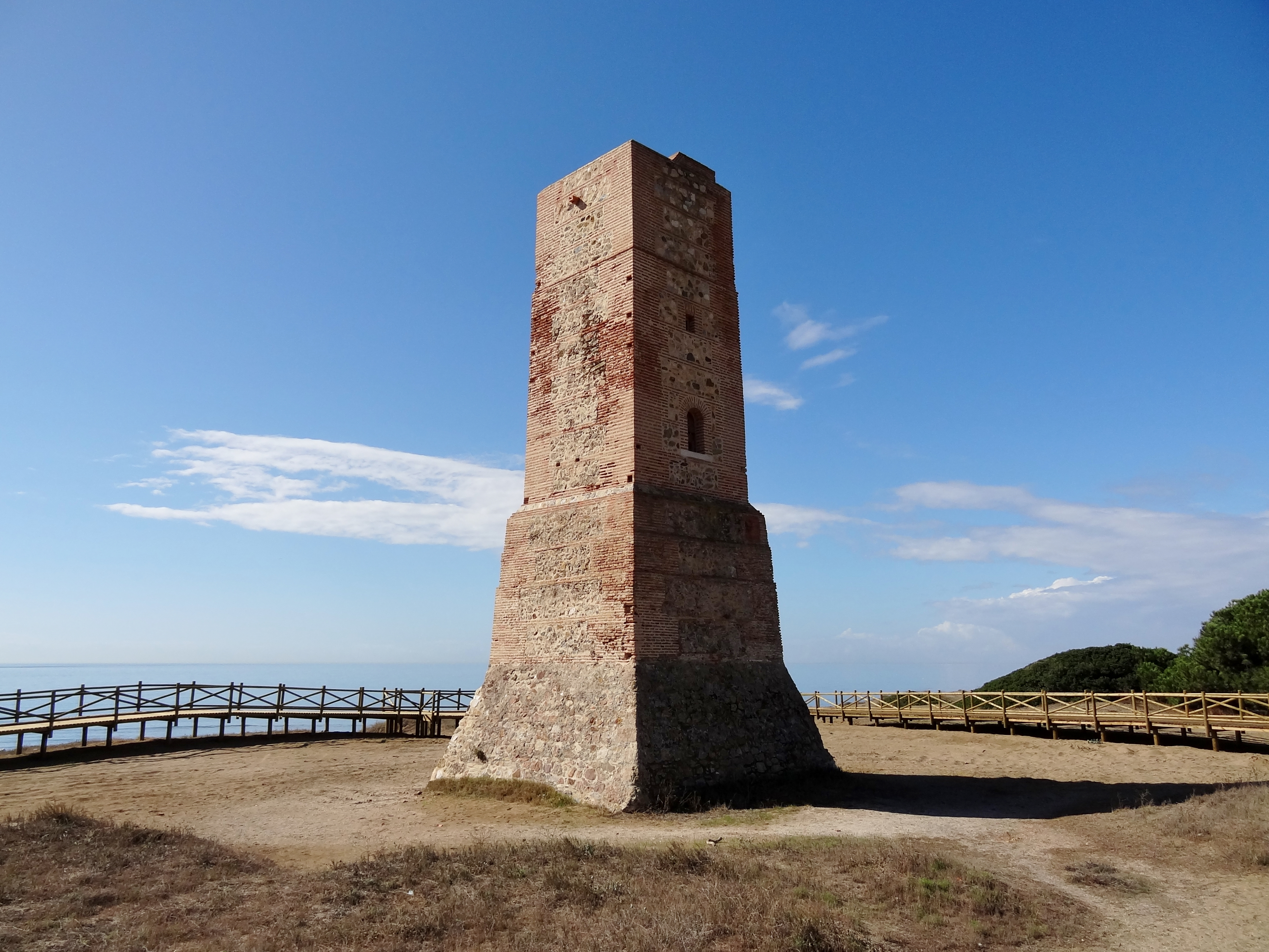 Torre Ladrones (‚Turm der Diebe‘) in Cabopino, Gemeinde Marbella, Provinz Málaga, Spanien